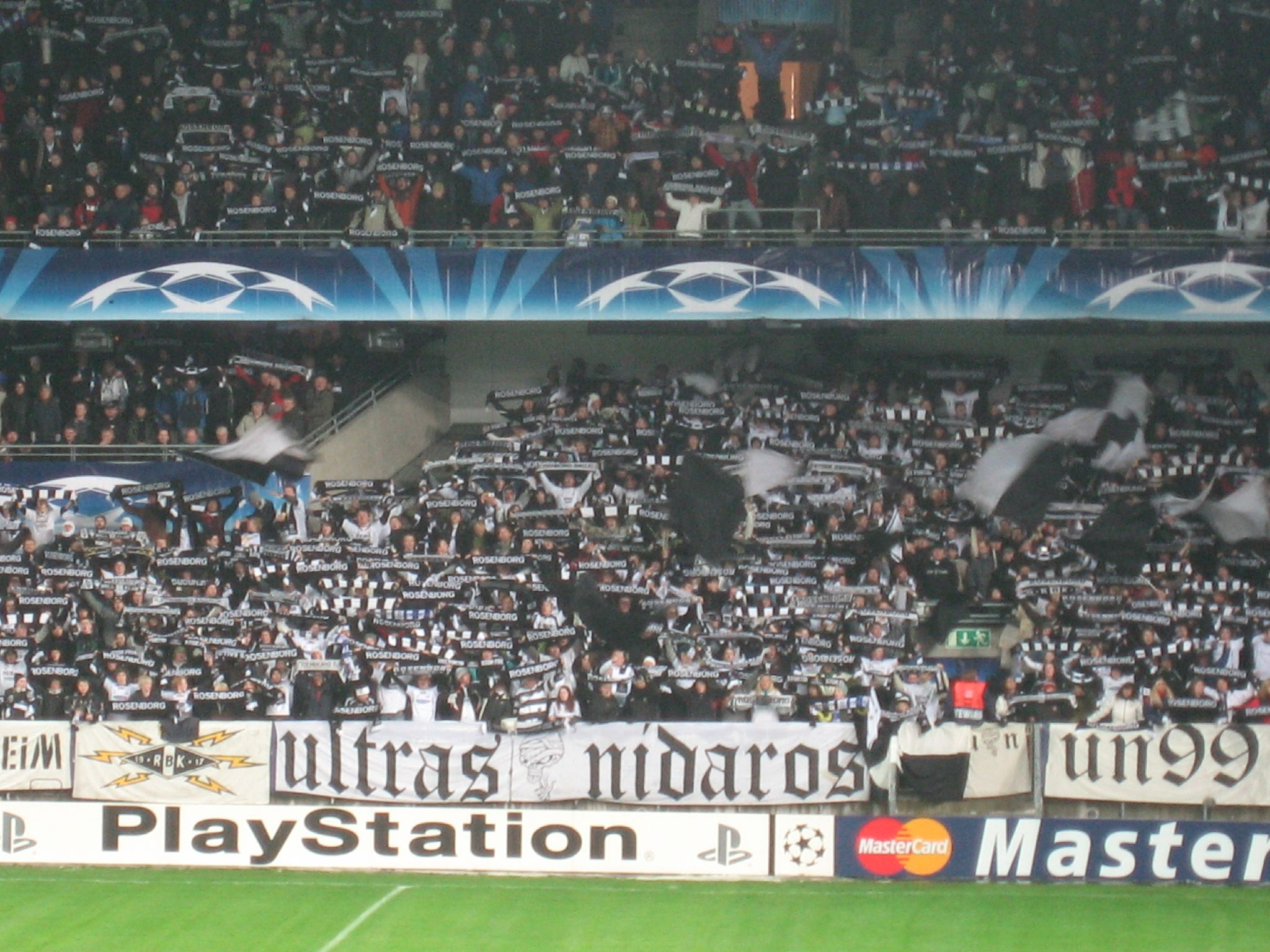 Kjernen og Ultras Nidaros, fra Rosenborg-Chelsea